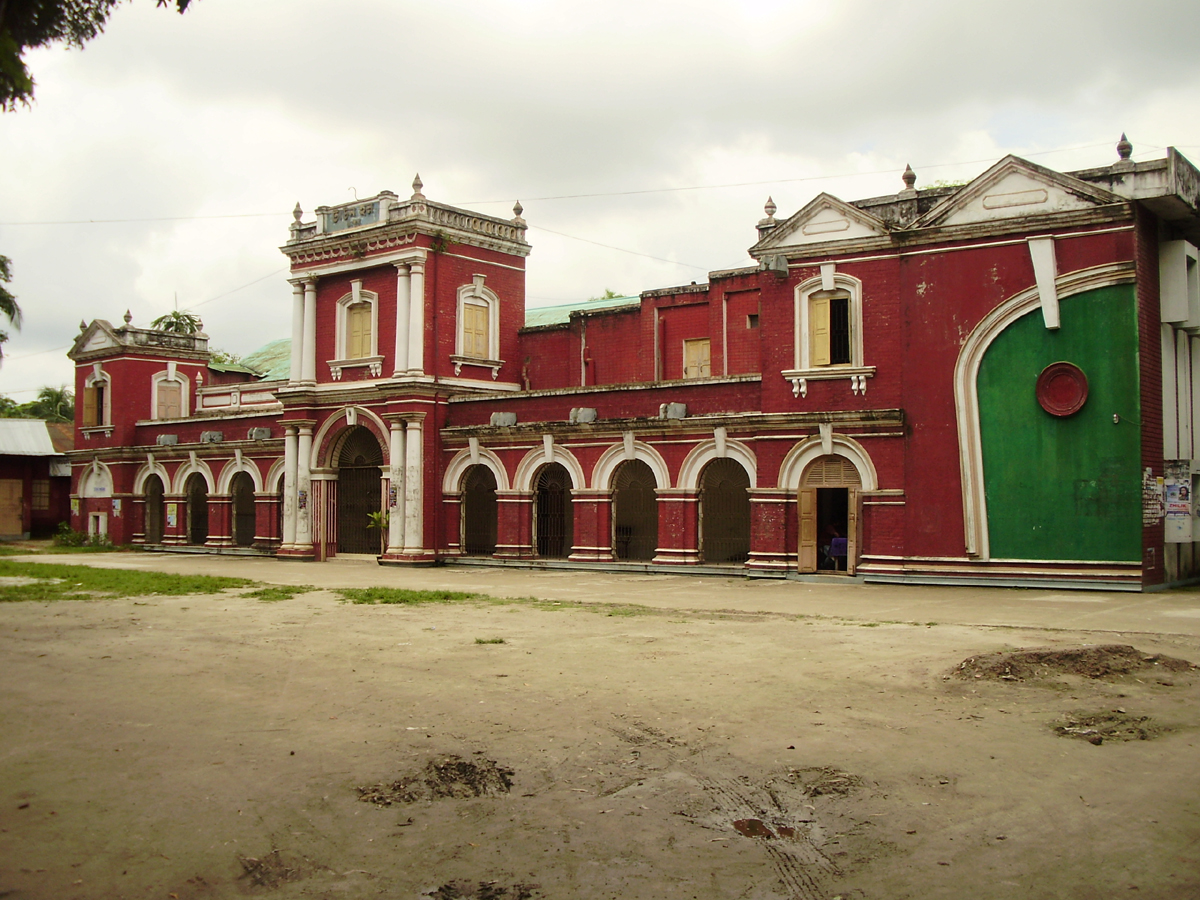 Rangpur Town hall, Bangladesh